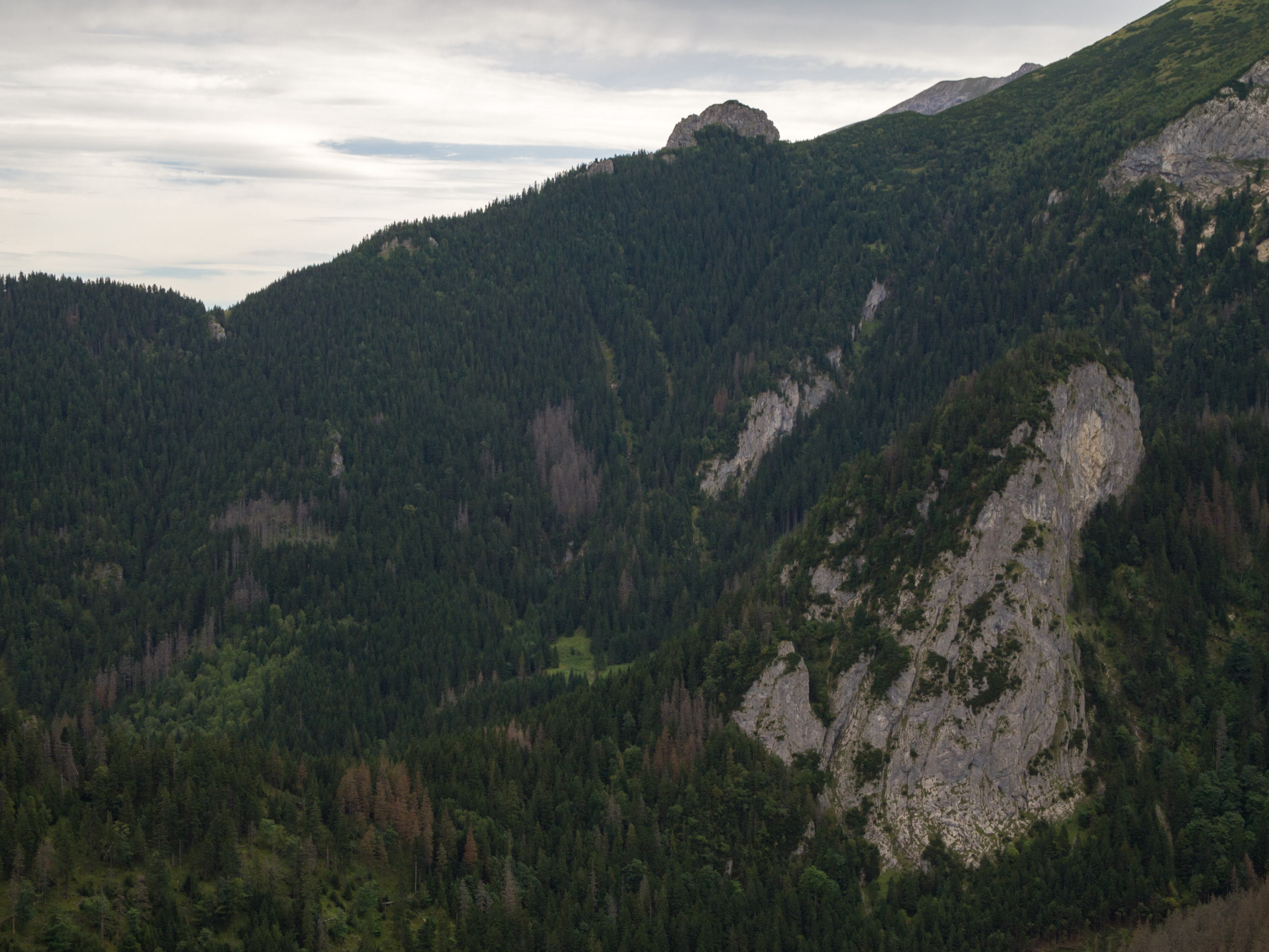 Turnia nad Jaworzynką, poniżej niej Żleb z Siką i fragment Polany pod Siką. Po prawej urwiska Łasztowicy.